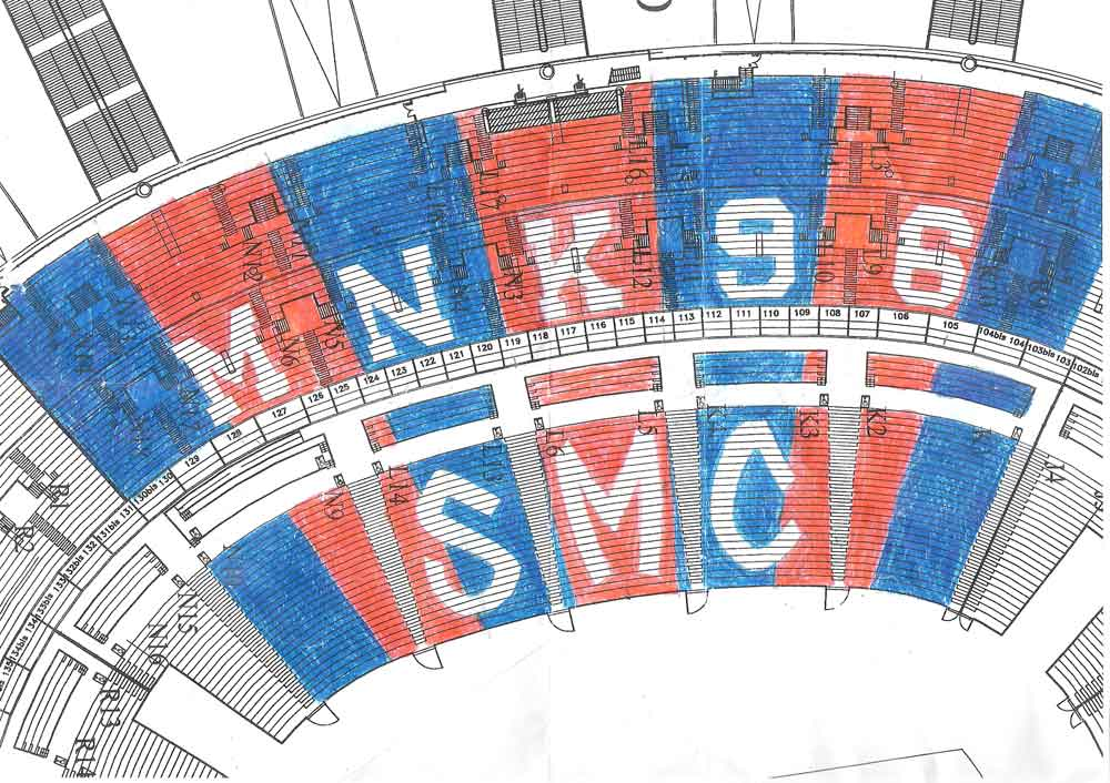 dessin du tifo du MNK lors de la finale de la coupe de la ligue 2005 au stade de France